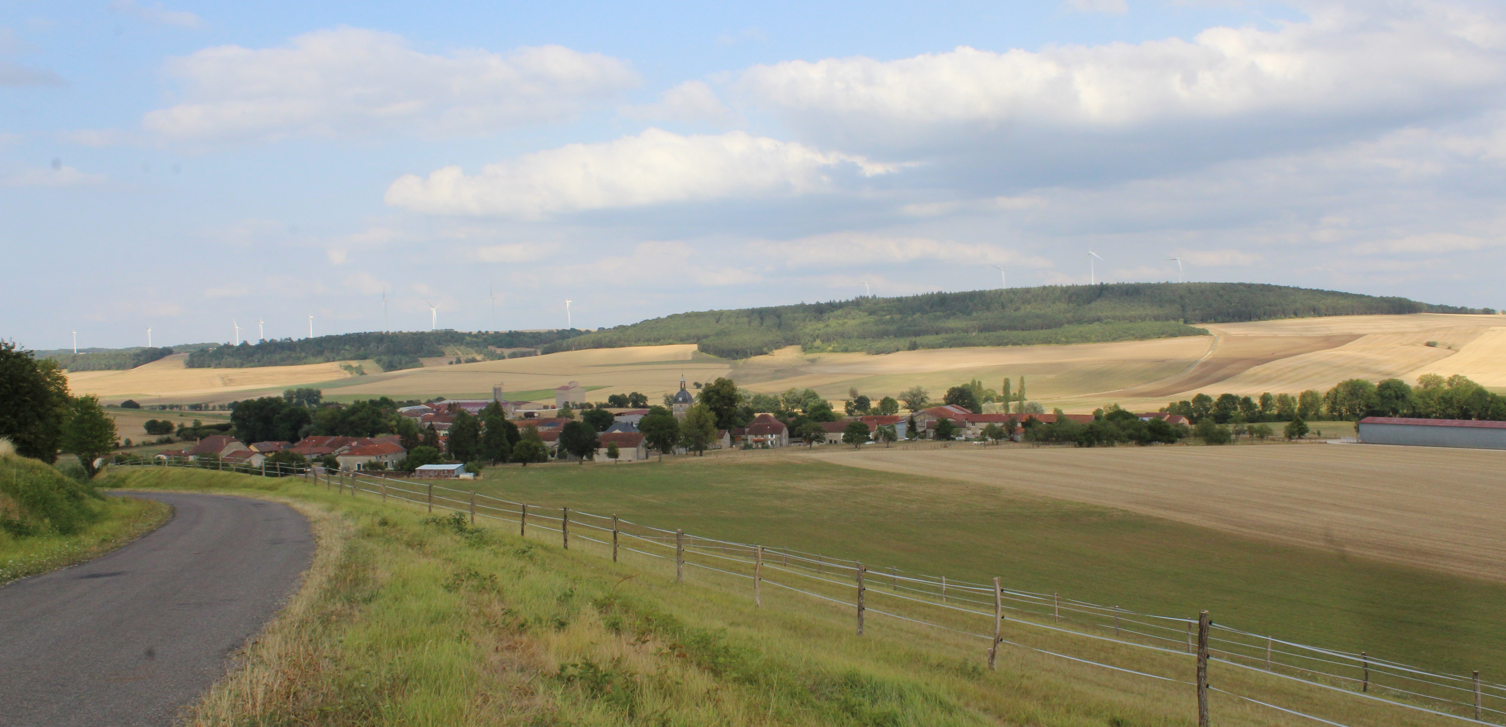 Panorama du vilage